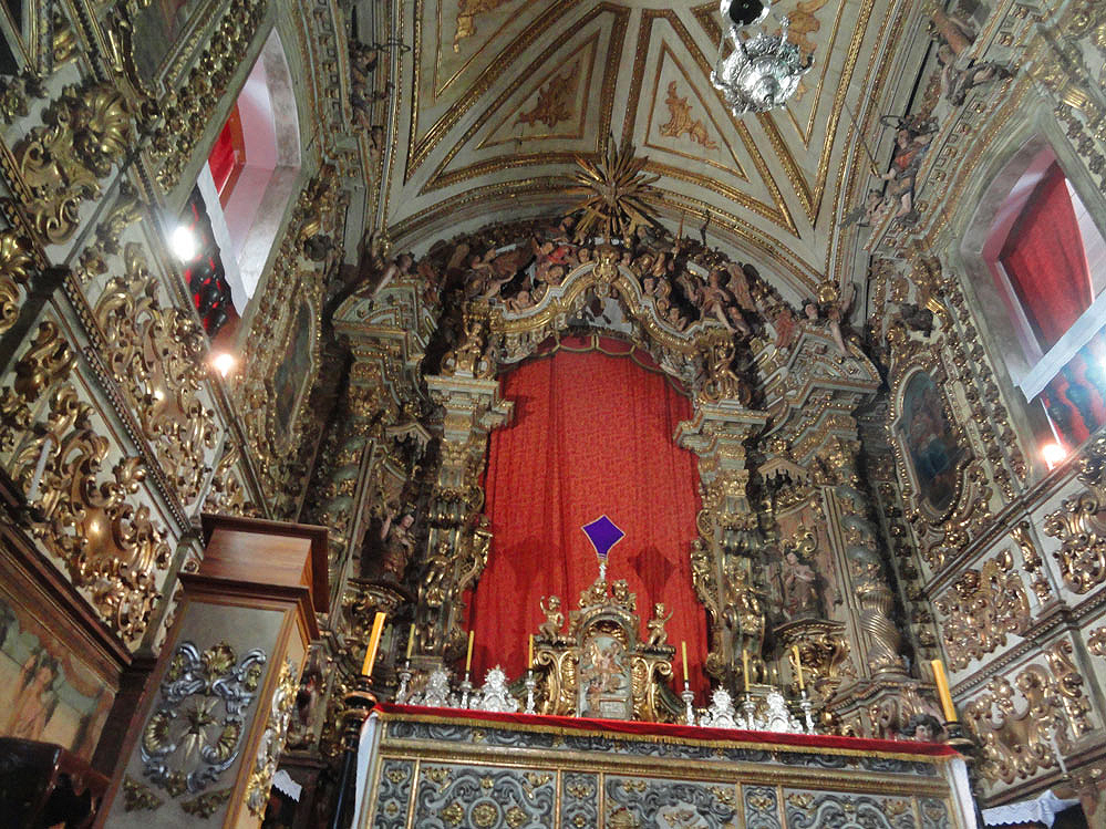 Igreja Matriz de Nossa Senhora do Pilar - Ouro Preto. O retábulo está coberto por ser tempo de Quaresma na ocasião em que a foto foi batida.